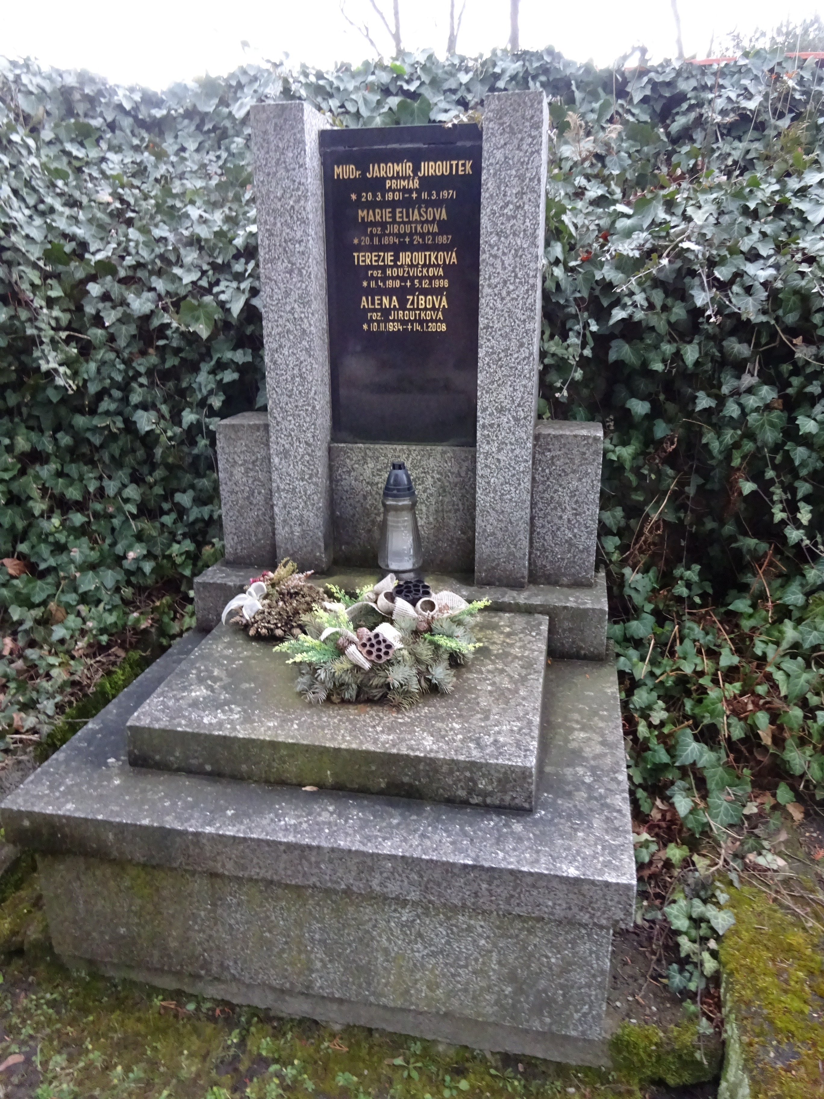 Hrob Mudr. Jaromíra Jiroutka v Kladně